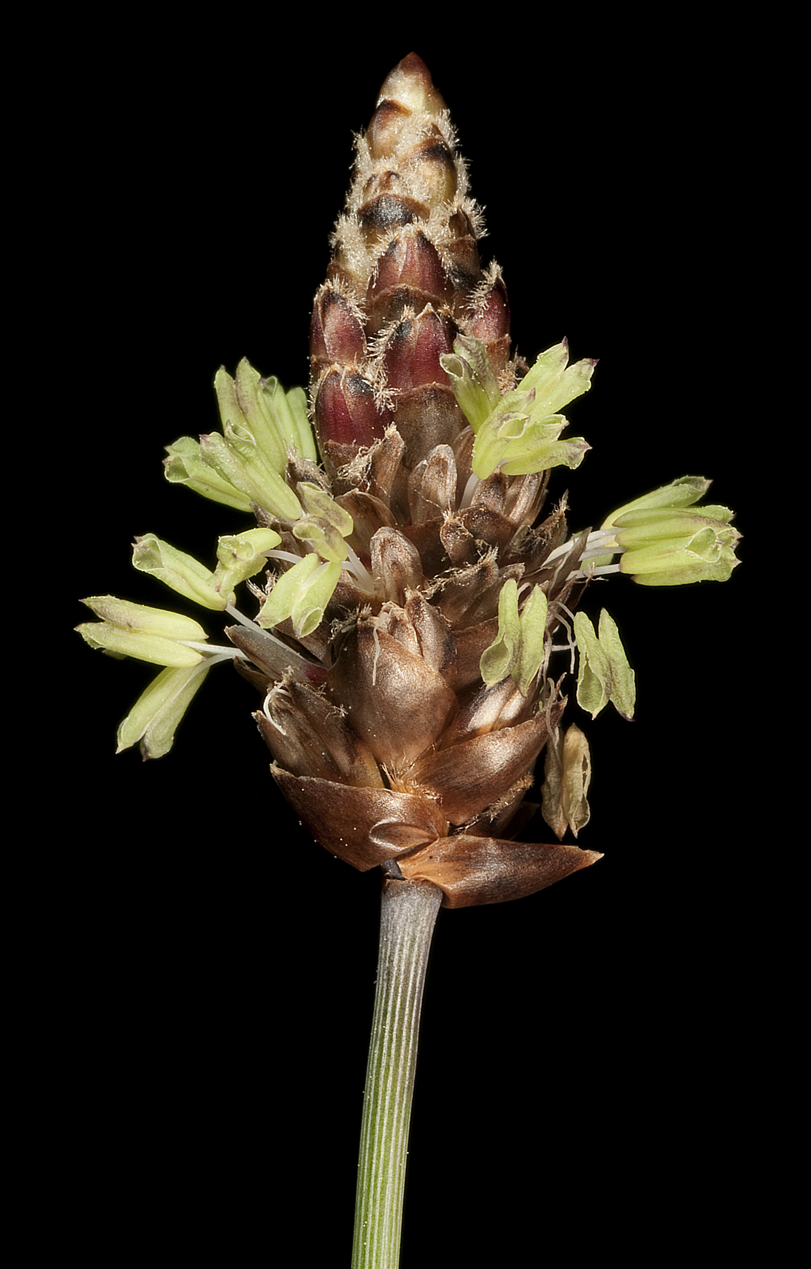 KRT4224